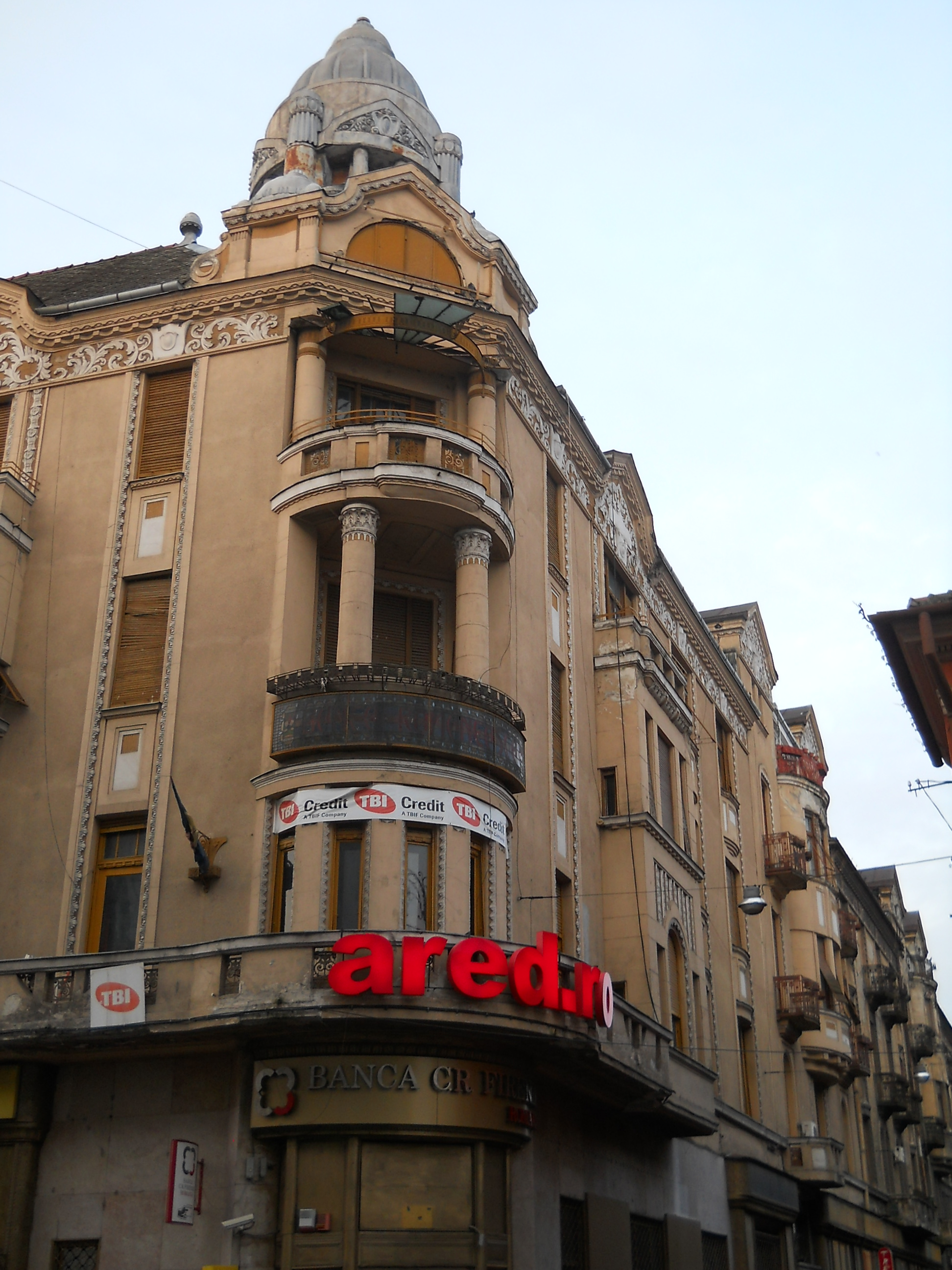 Palatul Bohus, vedere de pe celalalt trotuar. Partea dinspre strada Vasile Goldis